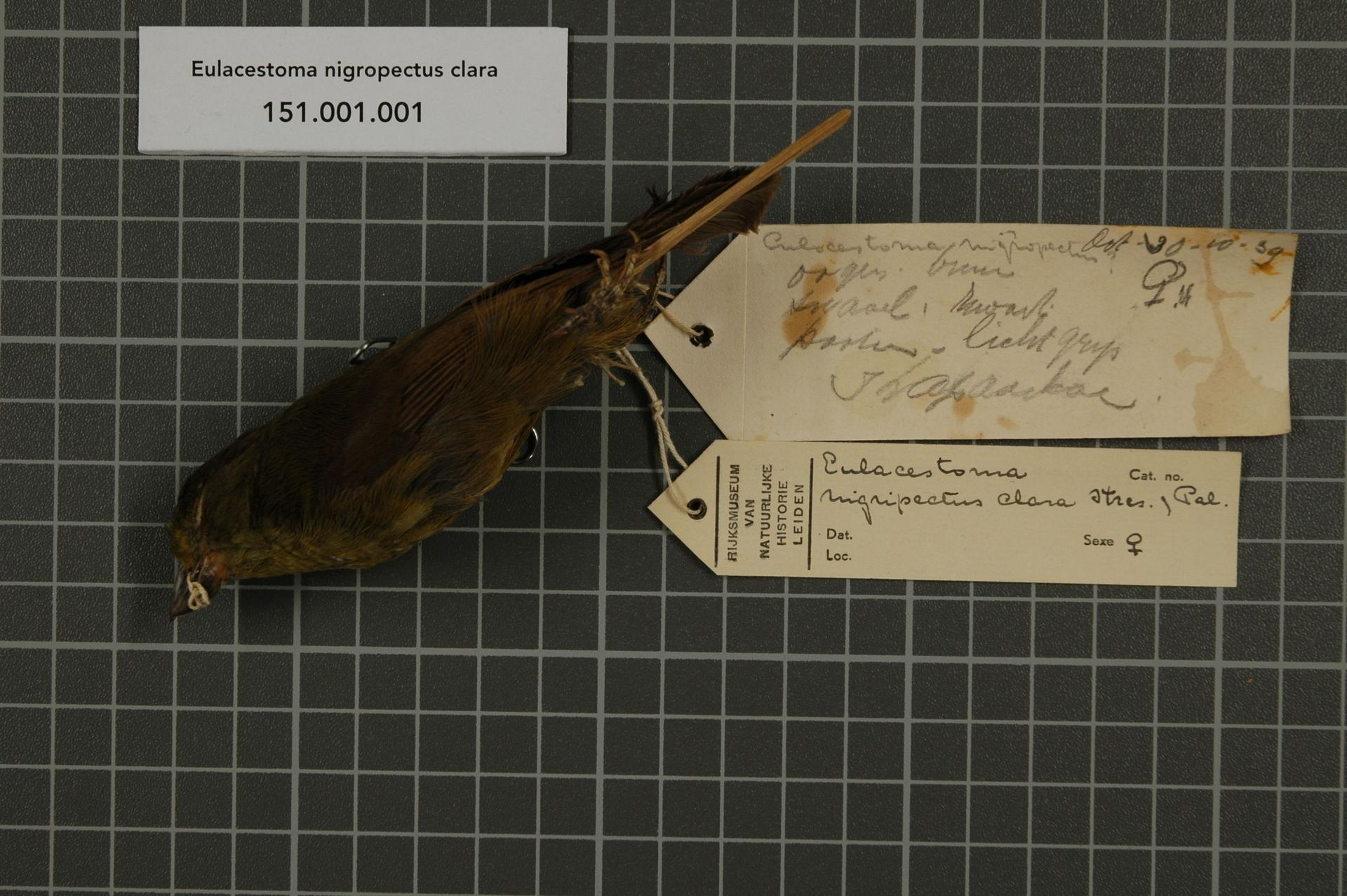 Eulacestoma nigropectus clara Stresemann and Paludan, 1934